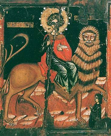 saint mamant of cappadocia (cesarea)